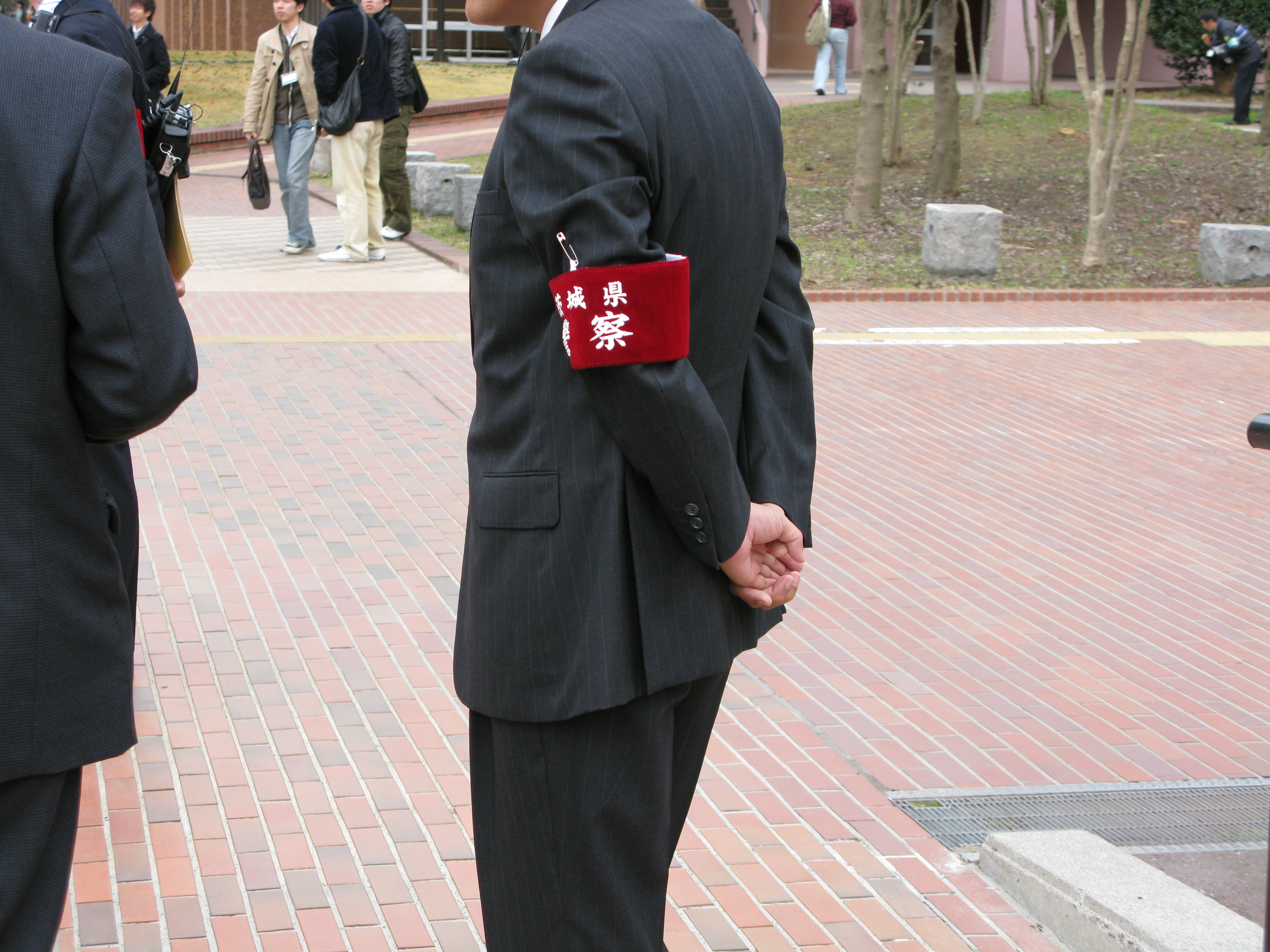 茨城県警